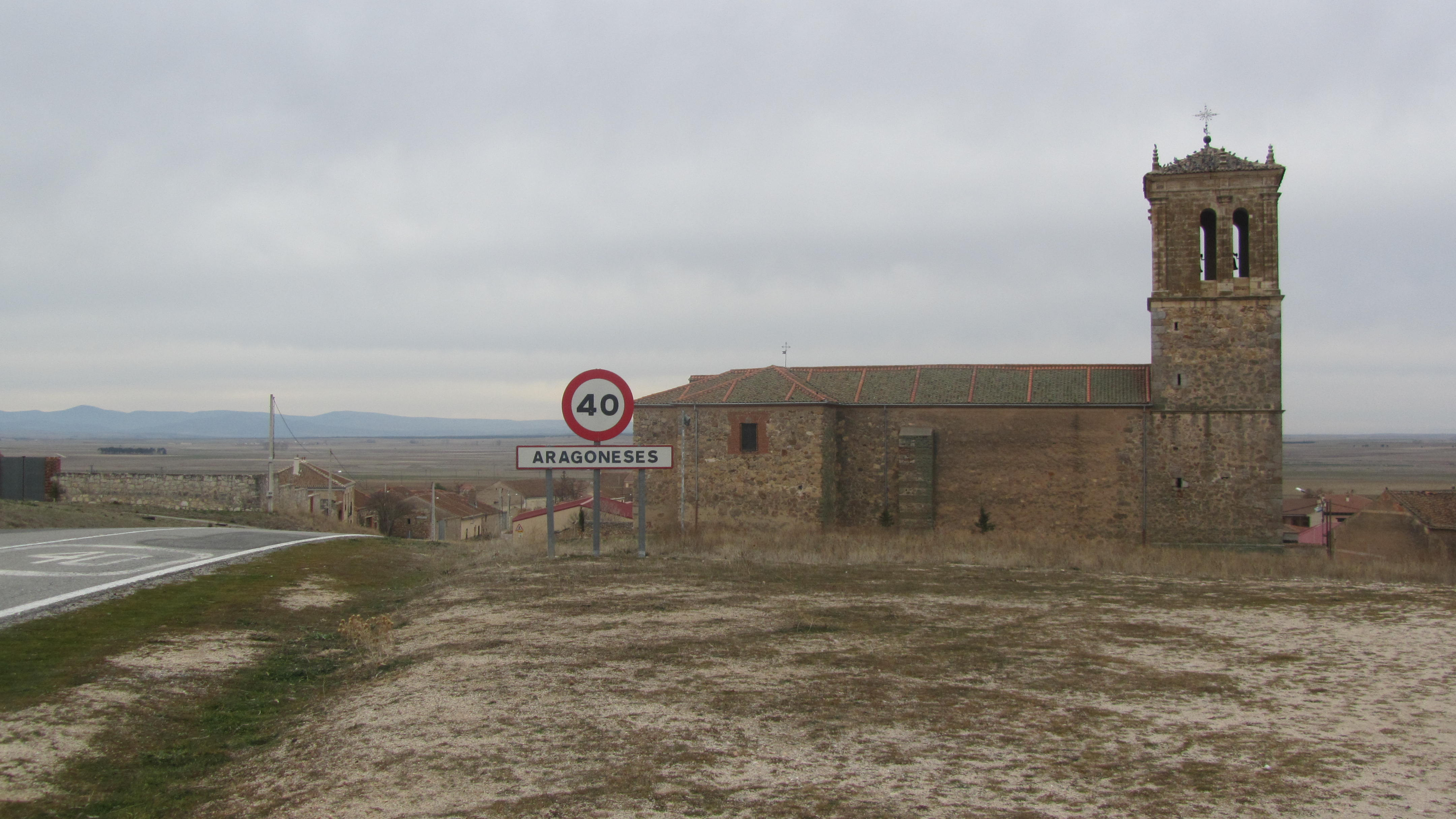 Aragonés: Aragoneses, lugarón segoviano de Santa María la Real de Nieva